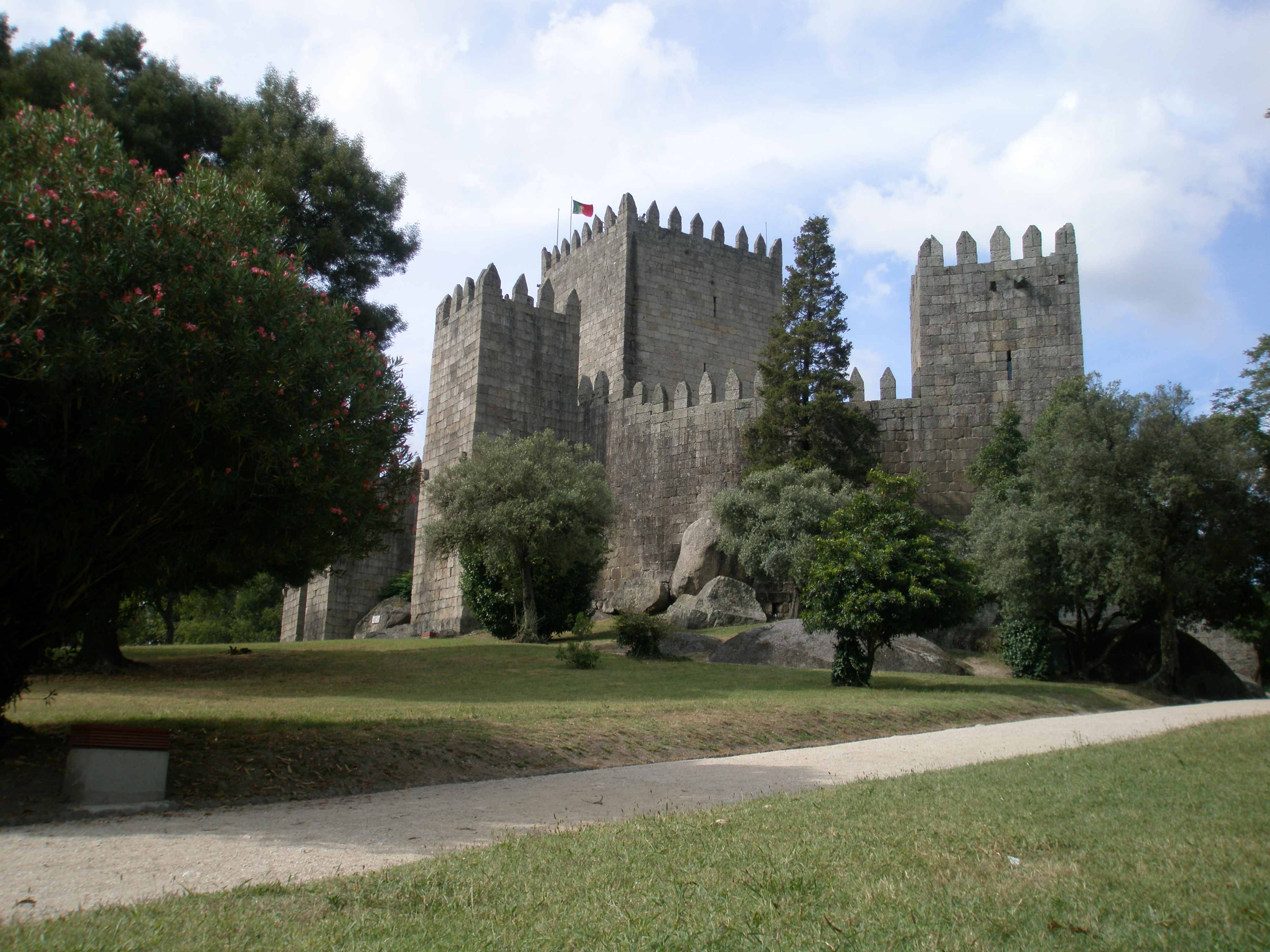 Fotografia do Castelo de Guimarães, lado Sul